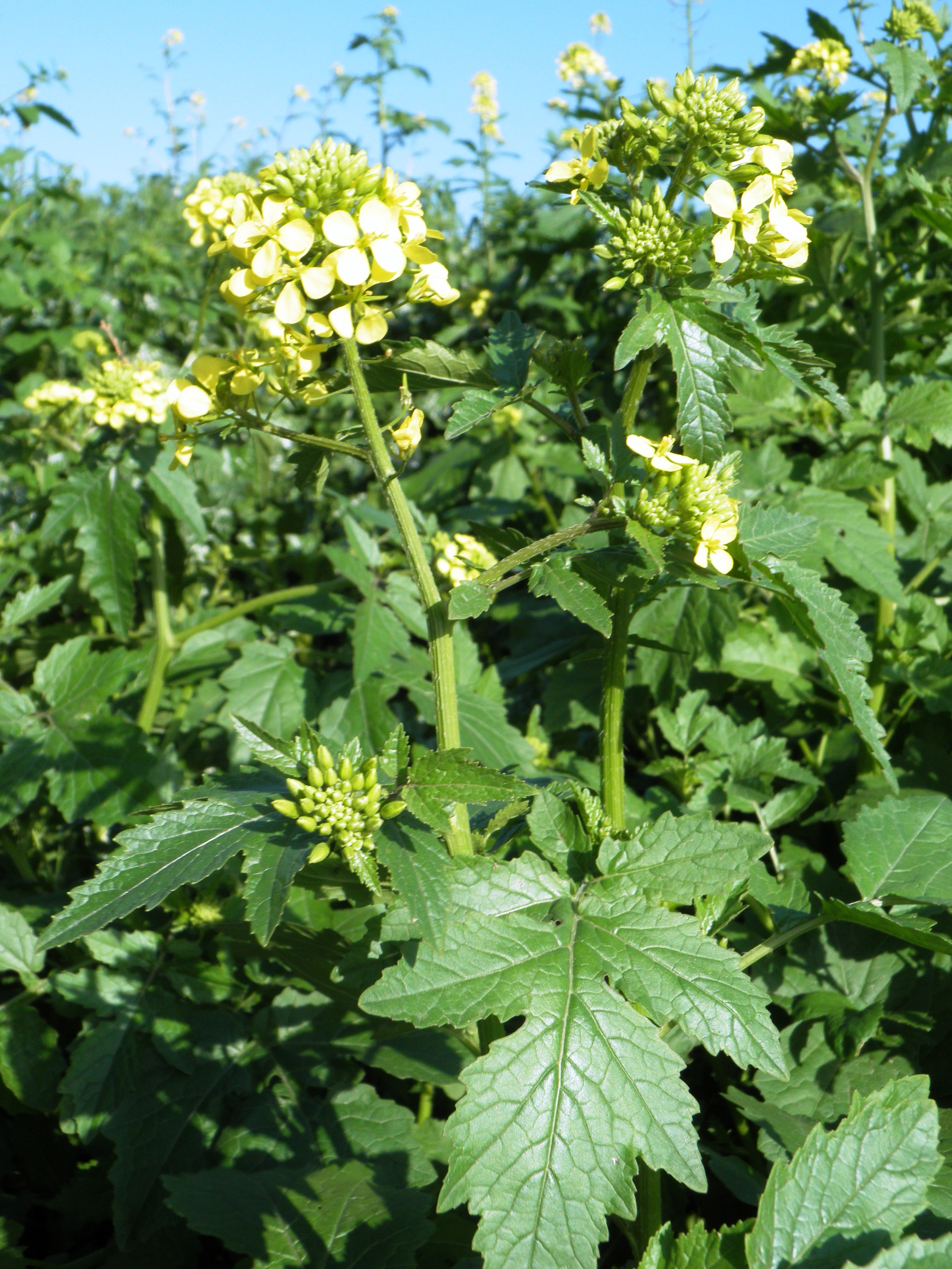 flowers חרדל לבן